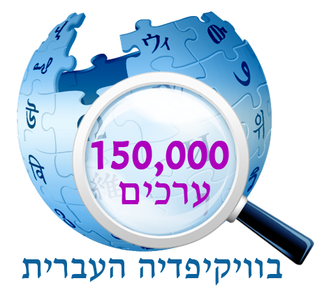 לוגו עבור 150 אלף ערכים בוויקיפדיה העברית